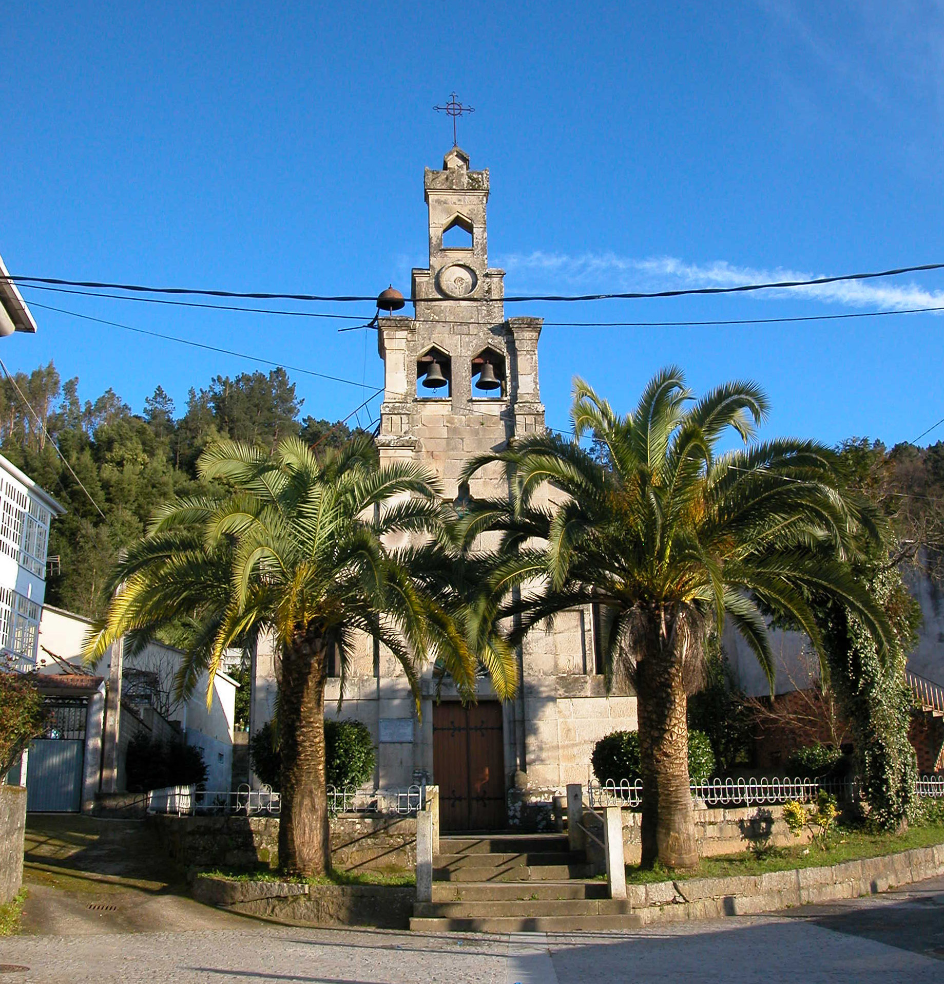 Igrexa de Cortegada de Baños Ourense - Galicia - Spain